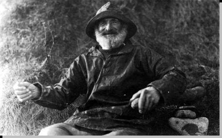 Le père Brumant, marin pêcheur du port du Houguet au début du XXème siècle